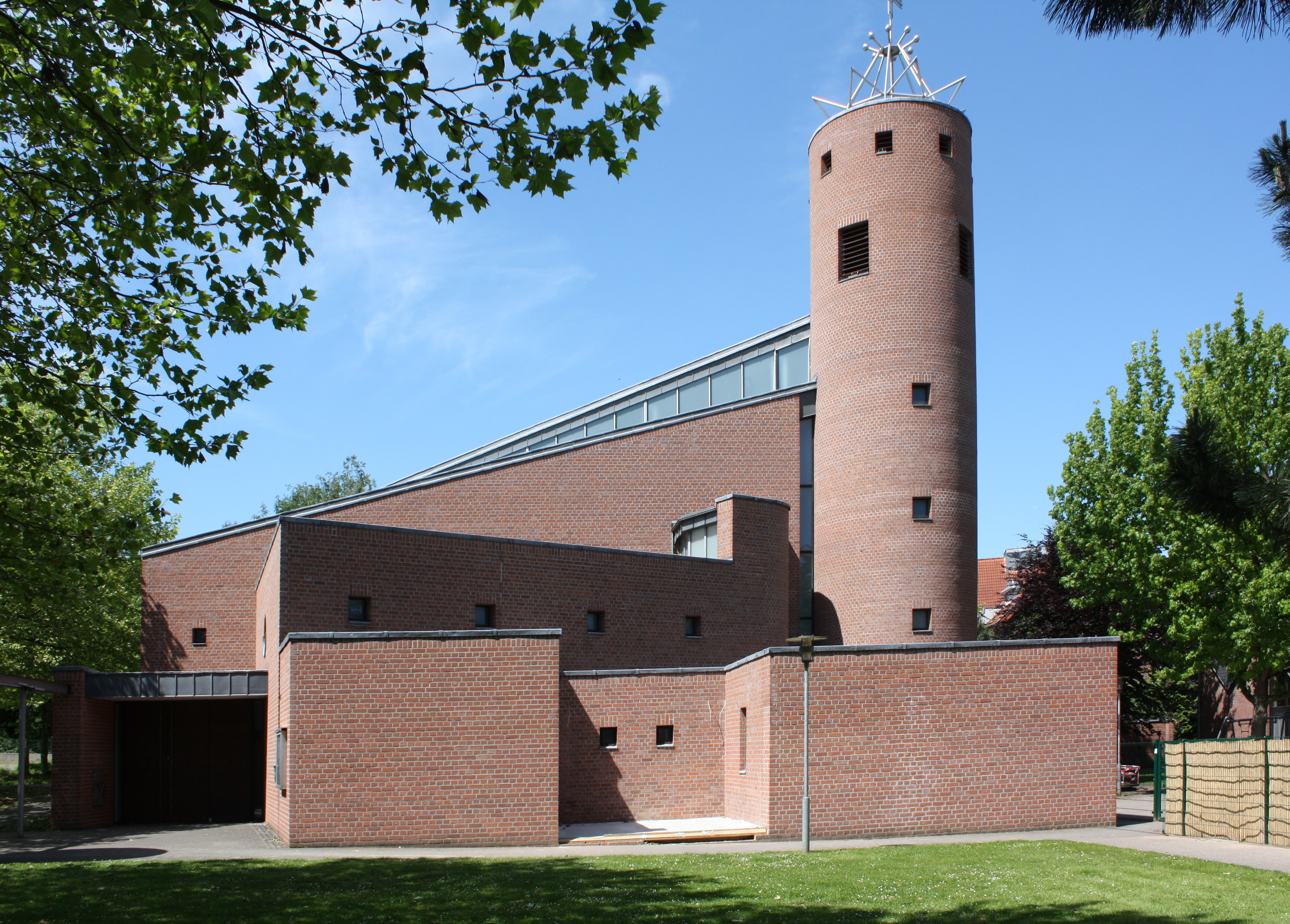 St. Josef, Kirchenzentrum Hürth